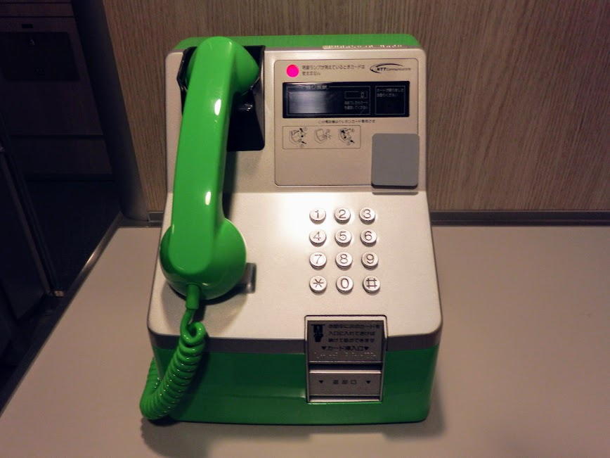 東北新幹線車内の公衆電話です